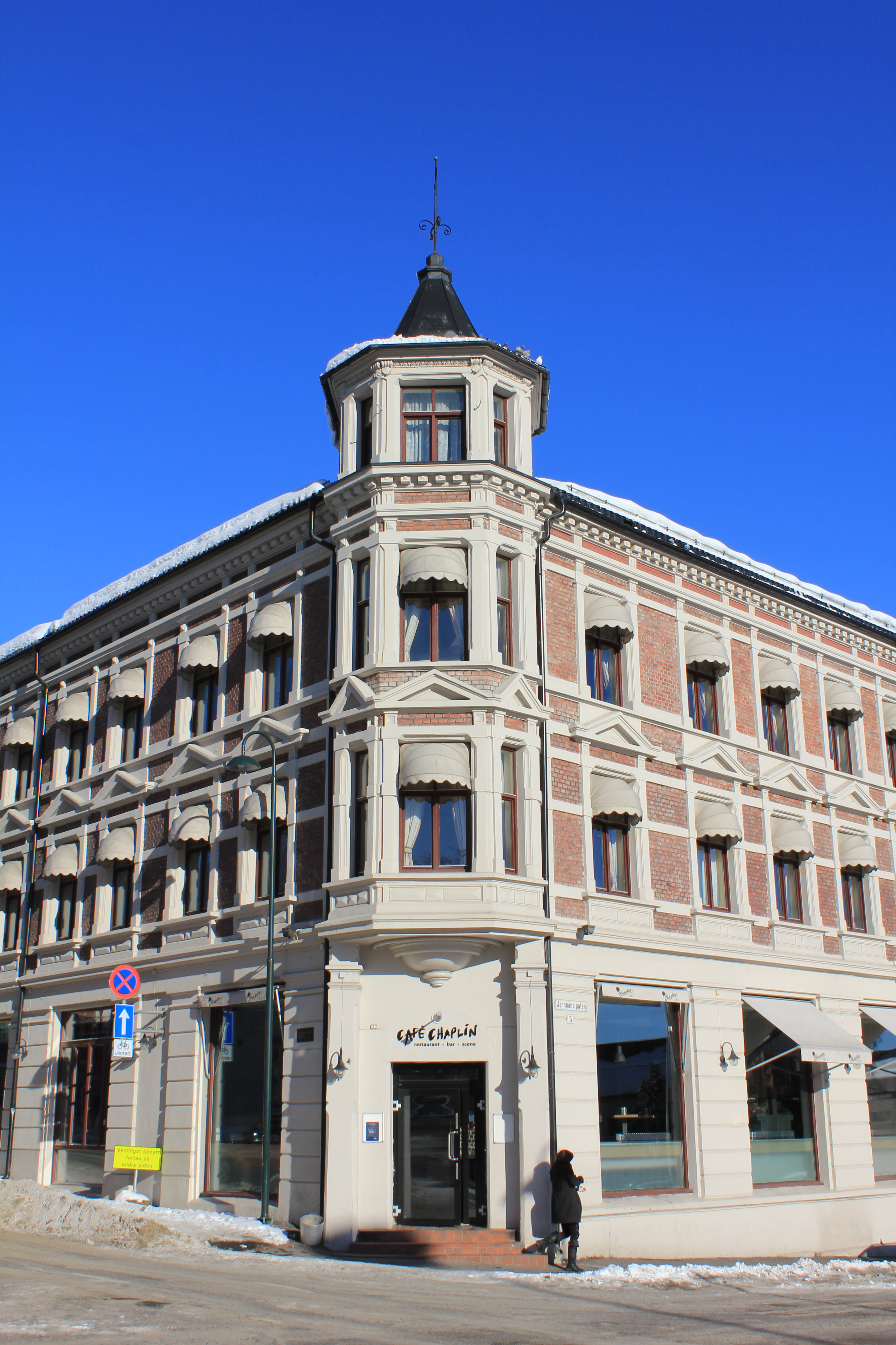 Cafè Chaplin på Gjøvik.